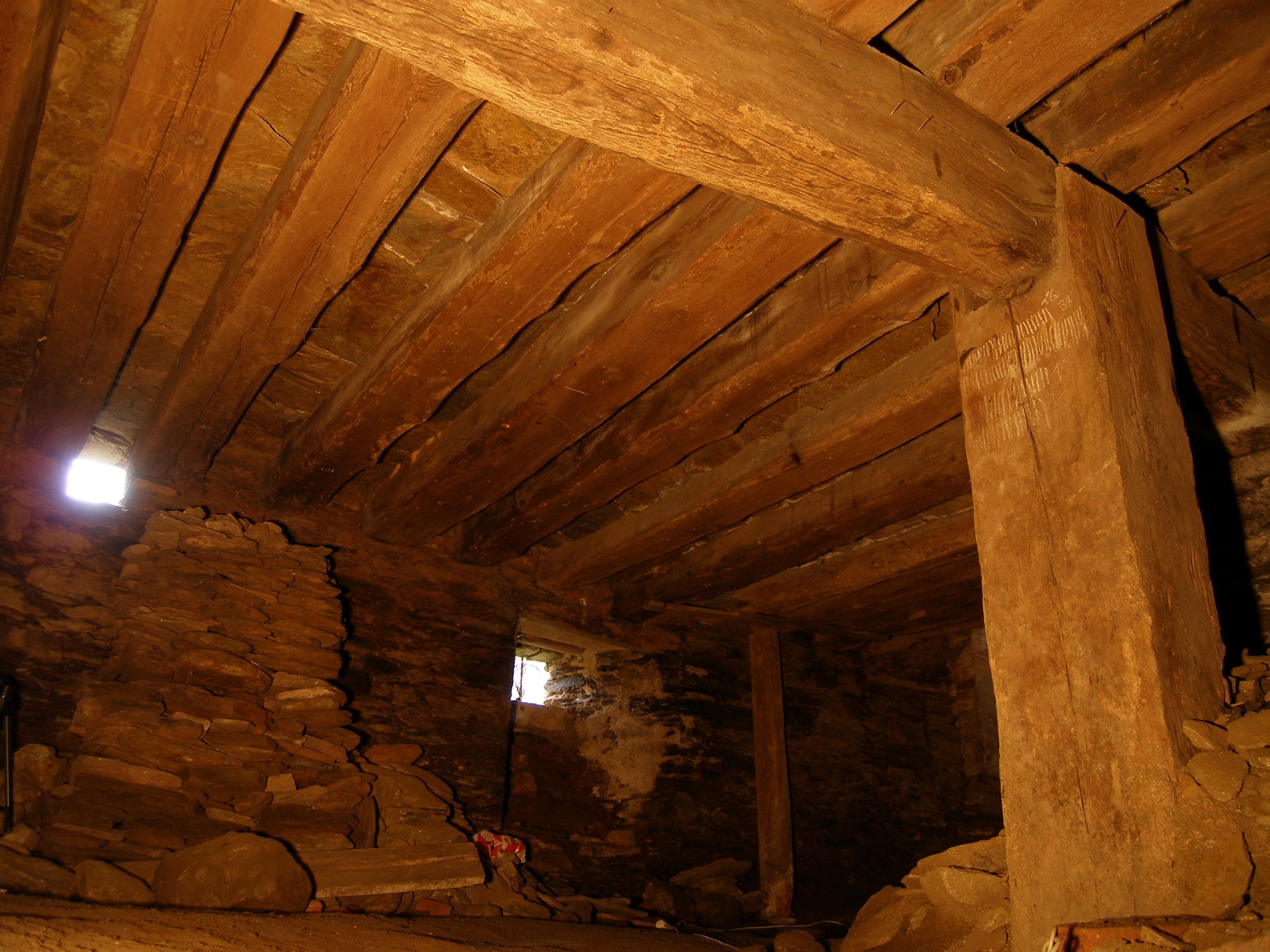 Toužim, Komárov čp. 12. Unikátní středověký trámový strop sklepa se záklopem z kamenných ploten z doby po roce 1484 v obytném stavení v areálu komárovské rychty.